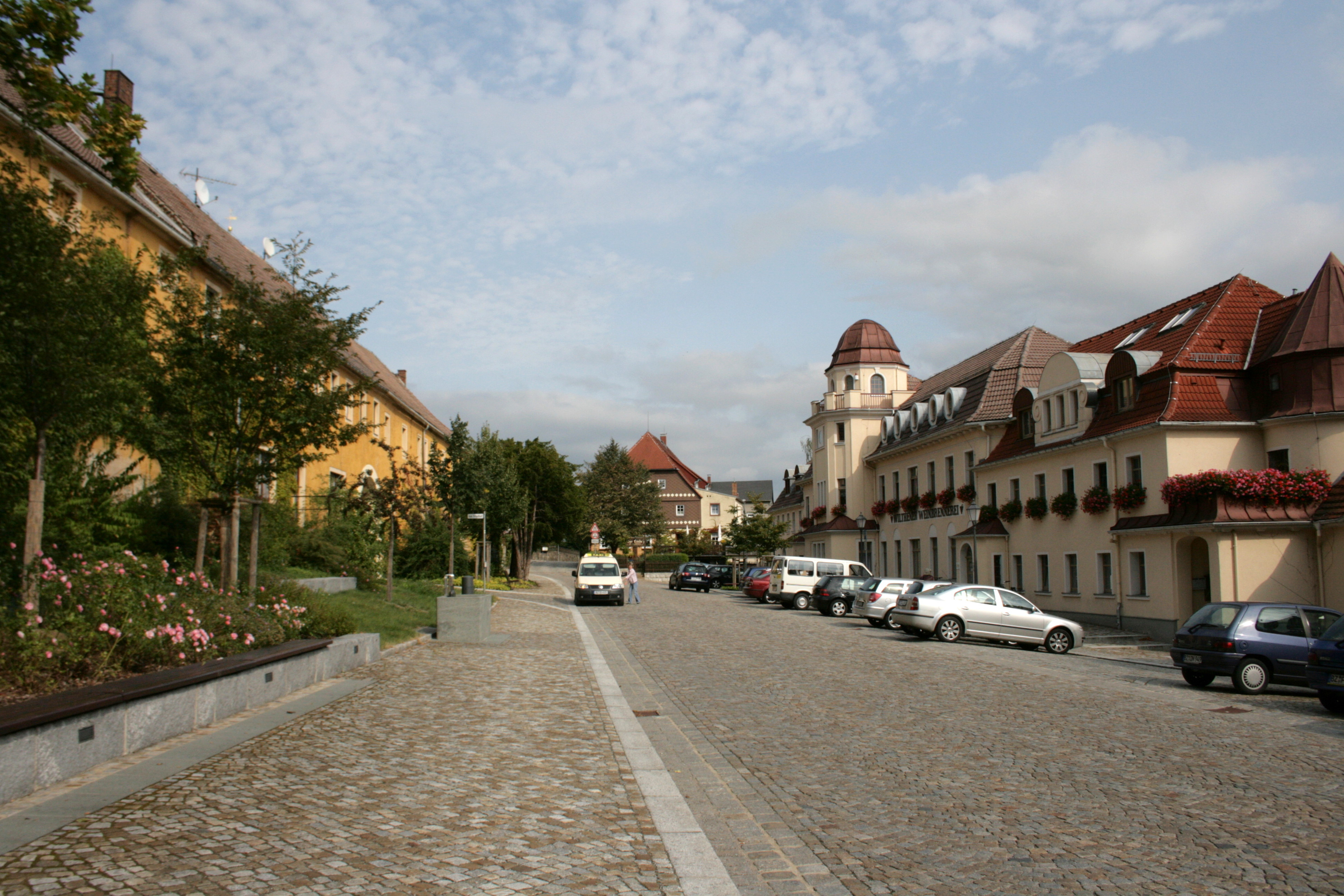 St.-Barbara-Platz in Wilthen